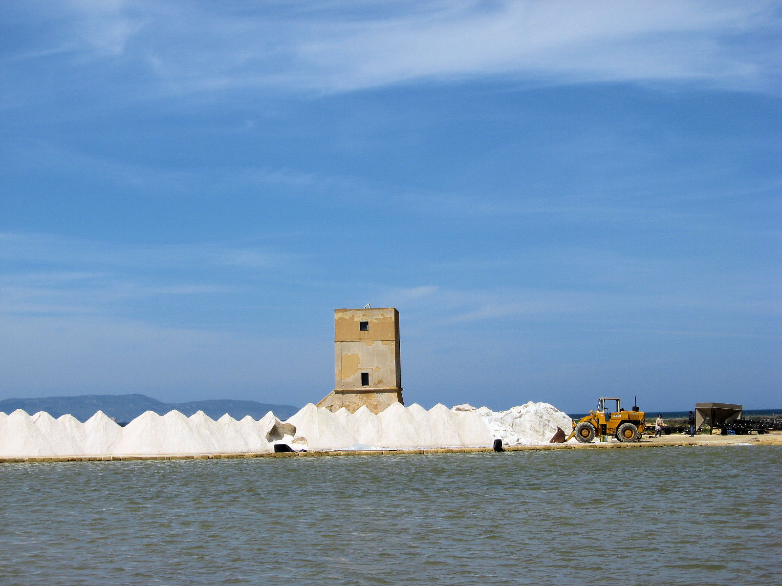 Raccolta del sale - Salina Culcasi, Trapani (Italy)